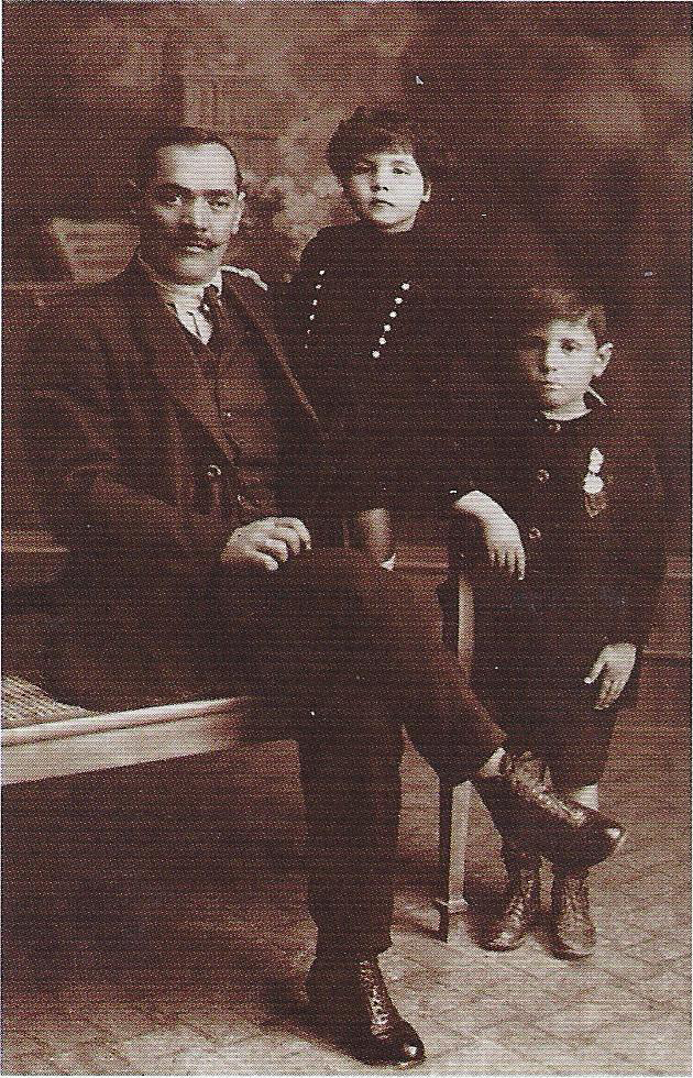 Ο Θανάσης Μανέτας με τα παιδιά του Βασιλική και Κωνσταντίνο.